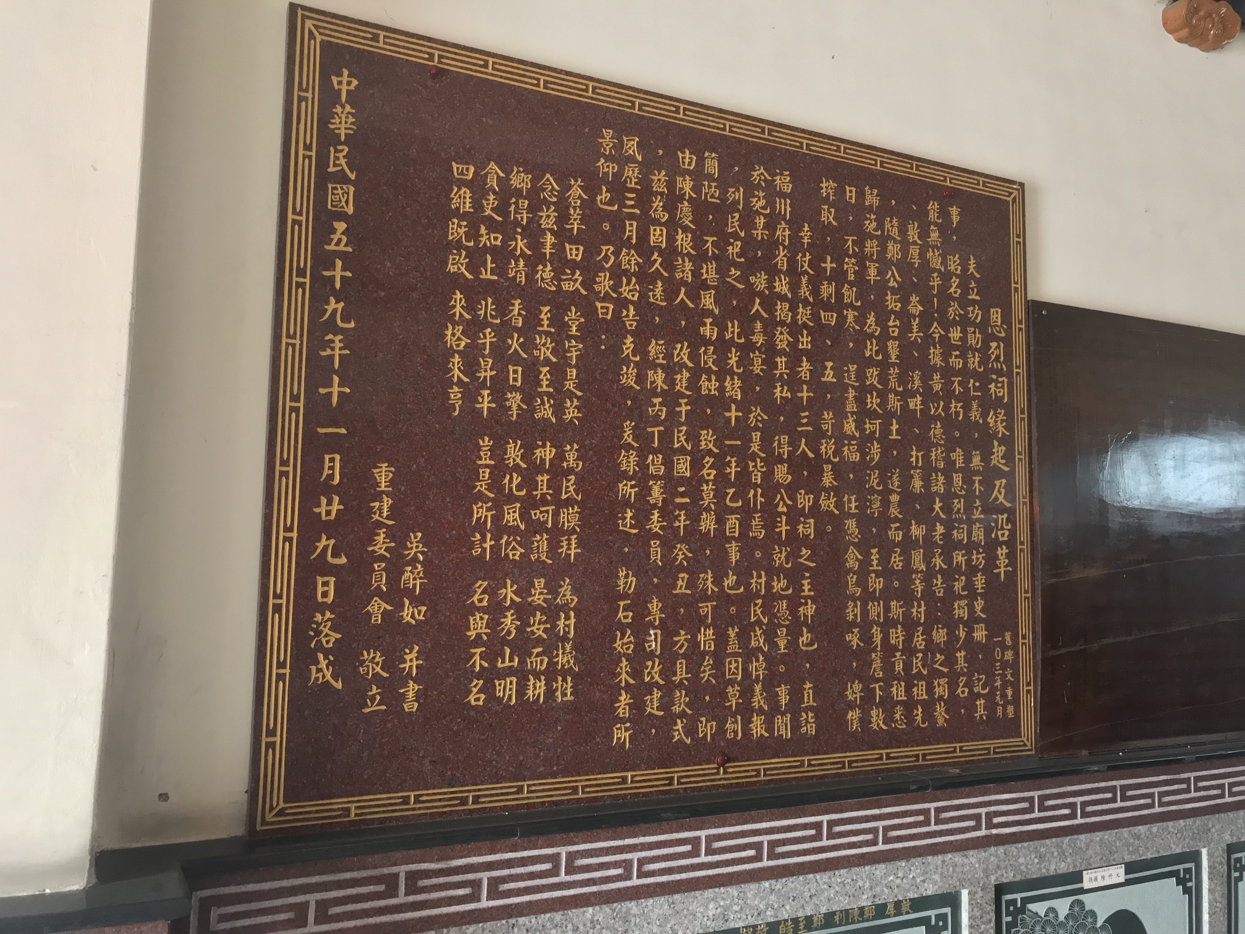 中文（台灣）: 恩烈祠緣起與沿革